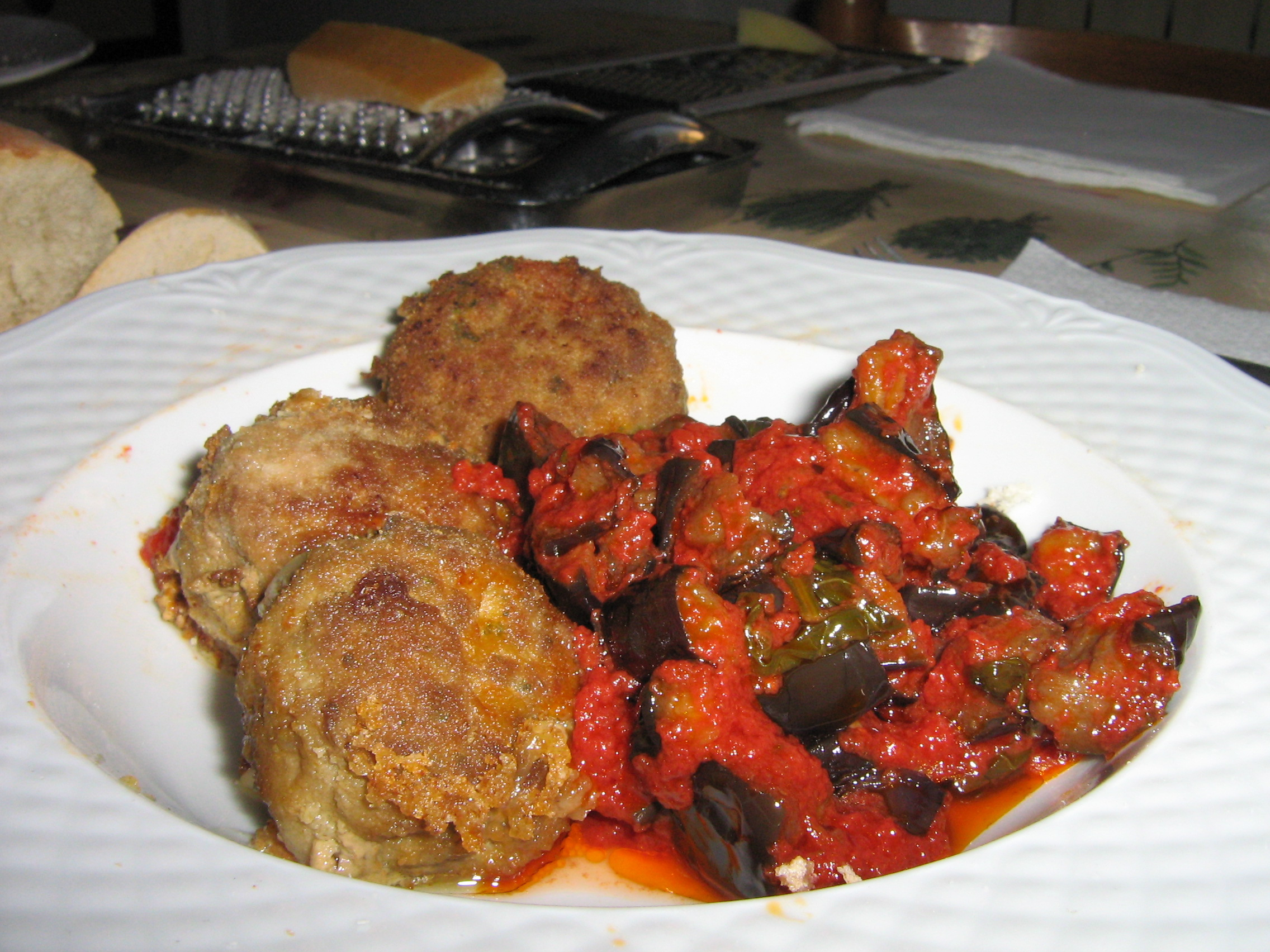 Secondi